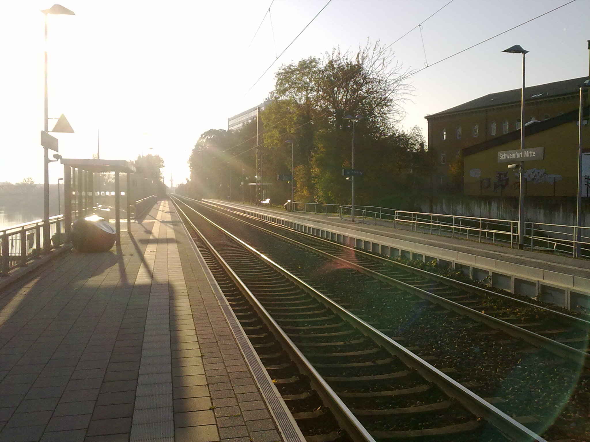 Haltepunkt Schweinfurt Mitte